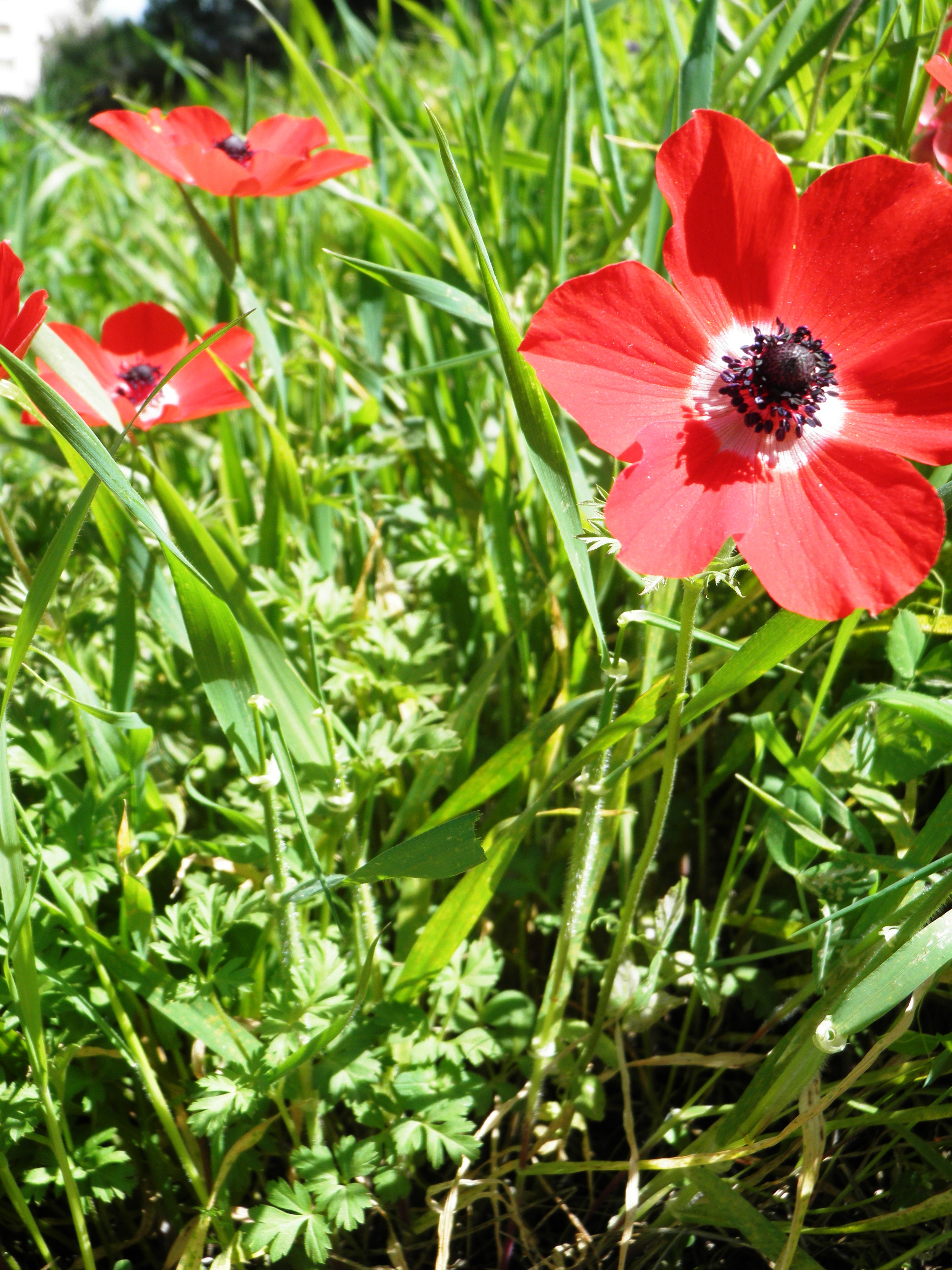 כלנית מצויה